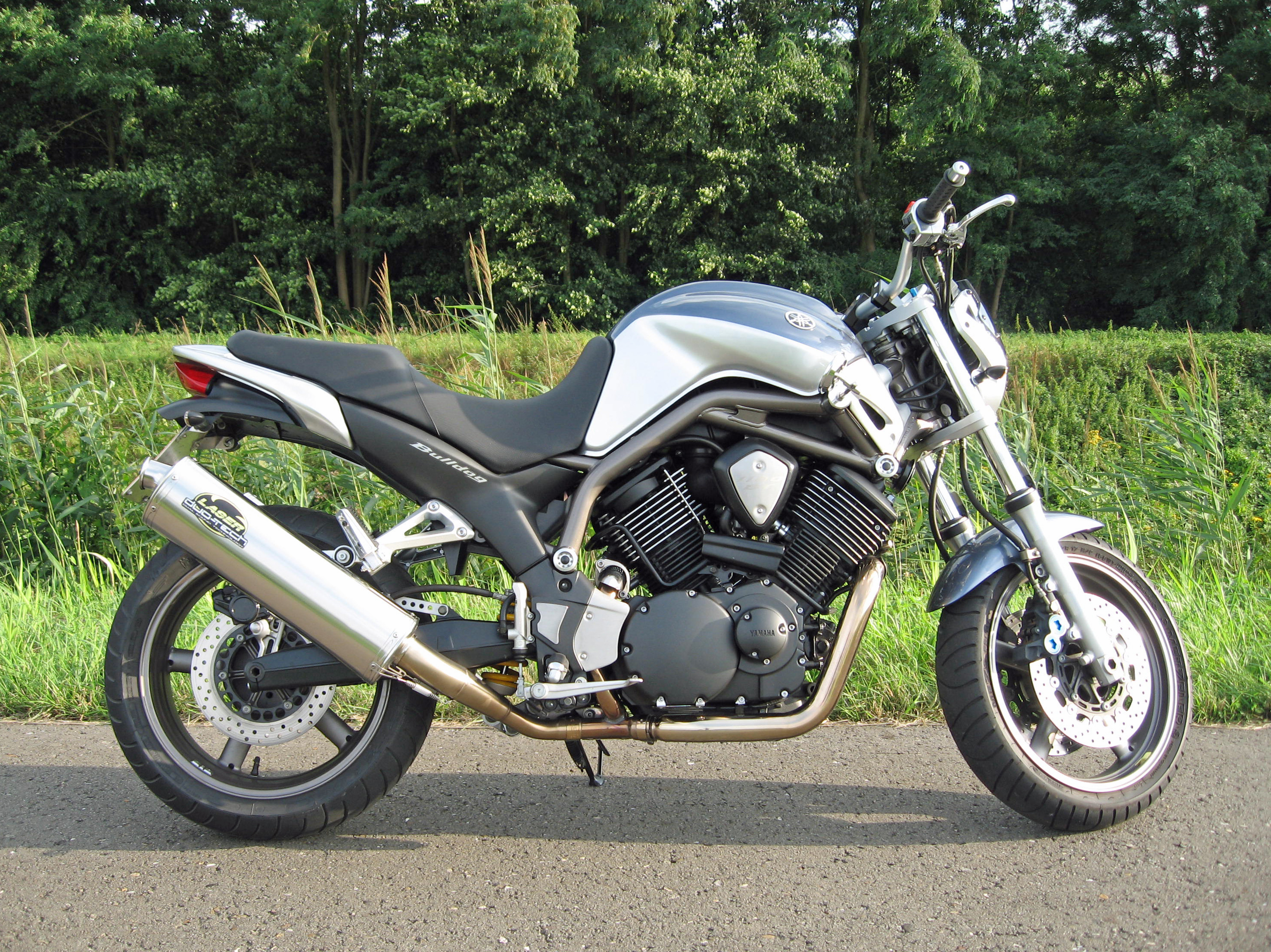 Yamaha BT1100 Bulldog